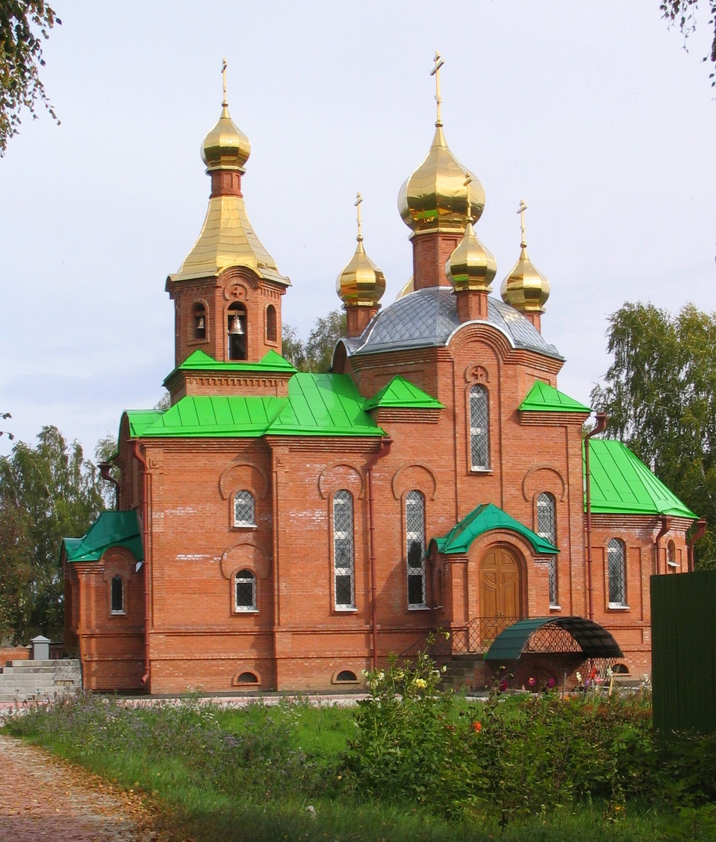 Church in Kozhevnikovo (Tomsk Oblast), built 1995.